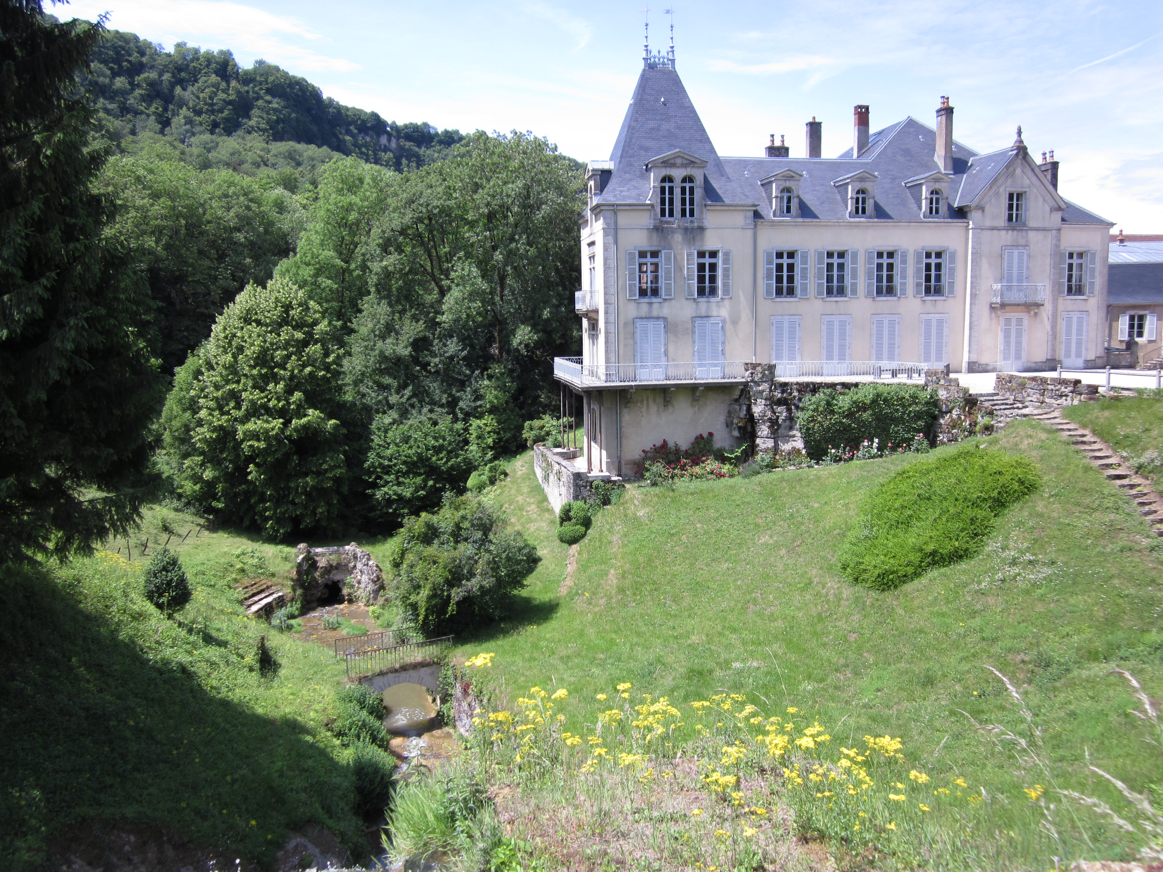 Vaux-sur-Poligny : Château de la fin du XIXe siècle et aménagement du parc et du ruisseau de la Glantine (construit par l'abbé Petit directeur du séminaire de Vaux)